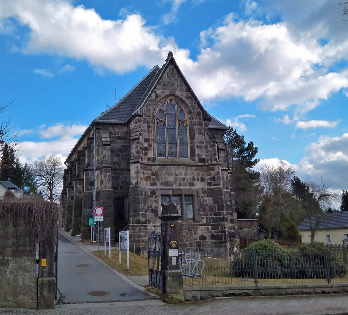 Ev.-Luth. Friedhofskapelle in Neustadt in Sachsen